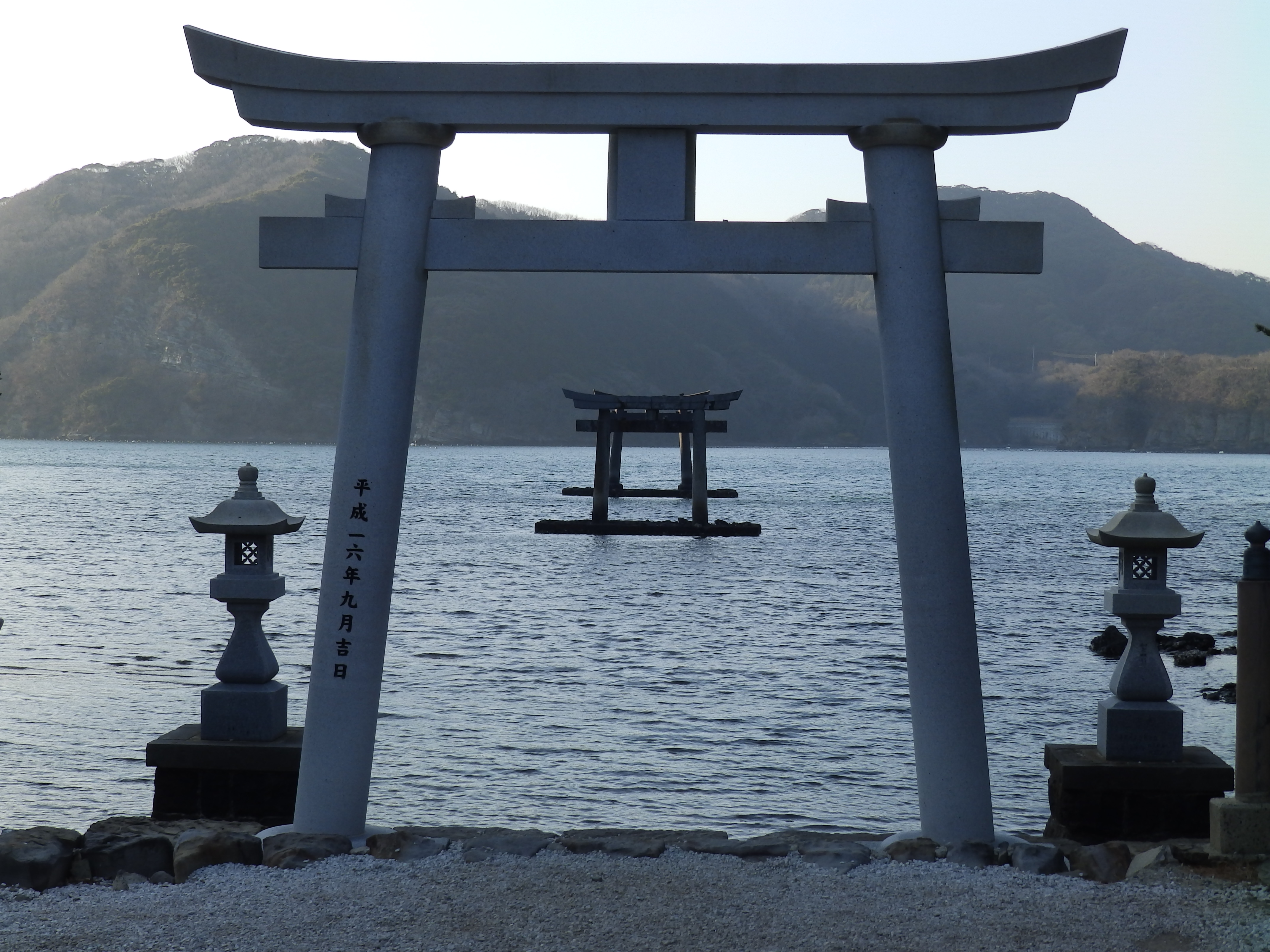 車道から海側を見た構図